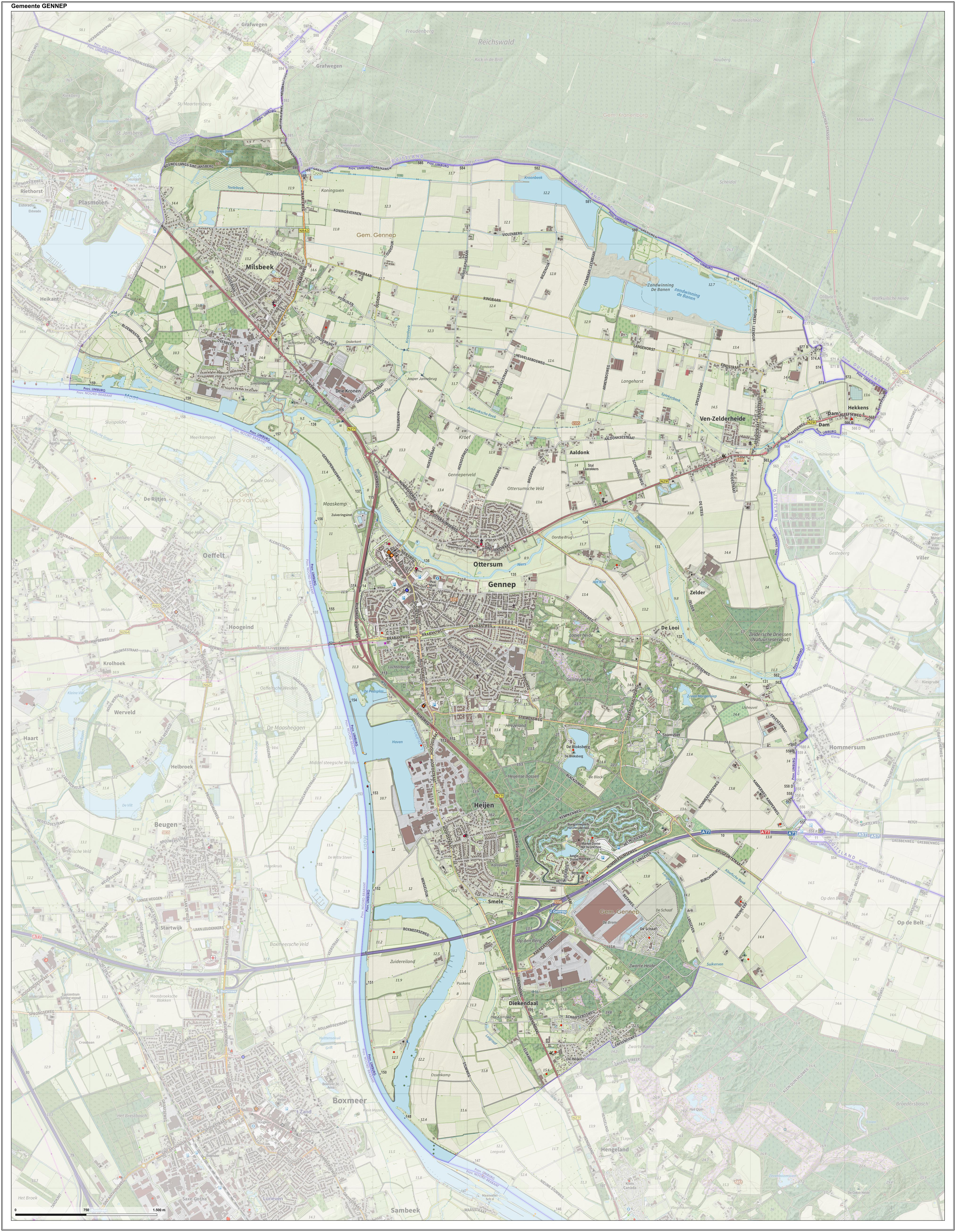 Topografische gemeentekaart. Resolutie: 400 pixels/km. Kaartbeeld samengesteld uit de open geodata van de Top10NL en Top25namen (Kadaster), Creative Commons-BY licentie. Gebouwvlakken uit open geodata BAG extract. Wegen uit de OpenStreetMap, OpenStreetMap community. Reliëfschaduw uit de Actuele Hoogtekaart AHN2. Samenstelling en kleurenschema: Jan-Willem van Aalst, met QGIS. Zie ook de Legenda.